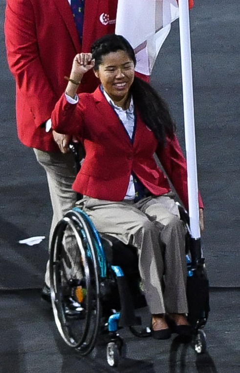 Rio de Janeiro - Cerimônia de abertura dos Jogos Paralmpicos Rio 2016 no Estdio do Maracanã (Tomaz Silva/Agência Brasil)